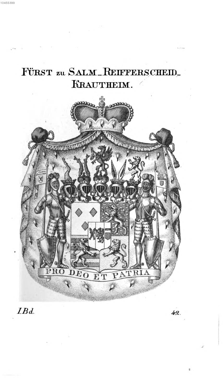 Wappen Salm Reifferscheid Krautheim - Tyroff AT.jpg